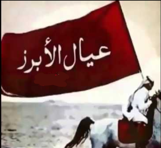 عيال الأبرز هو اسم شهرة تنتخي به قبيلة العقيدات الزبيدية